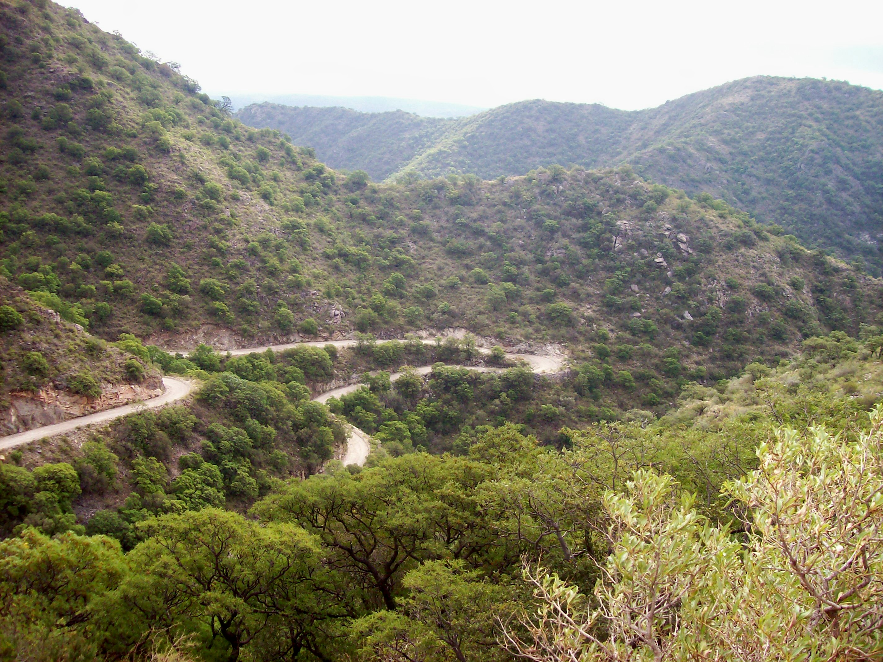 Camino de Cuchi Corral hacia el Río Pintos, en la provincia de Córdoba, Argentina. Se observa el bosque autóctono de quebrachos colorados.Las coordenadas geográficas pueden estar erradas en no más de 2 km